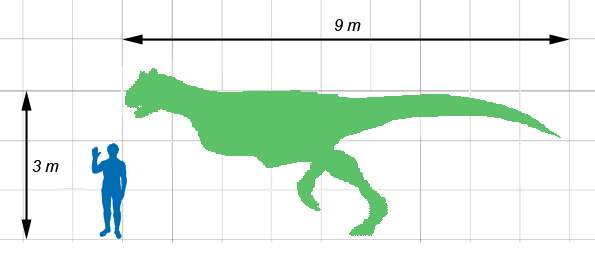 Comparación de tamaño de carnotaurus con un hombre